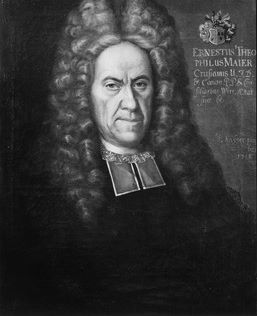 Ernst Theophil Maier, gen. Maier-Crusianus (1651-1727). Gemälde in der Professorengalerie Tübingen